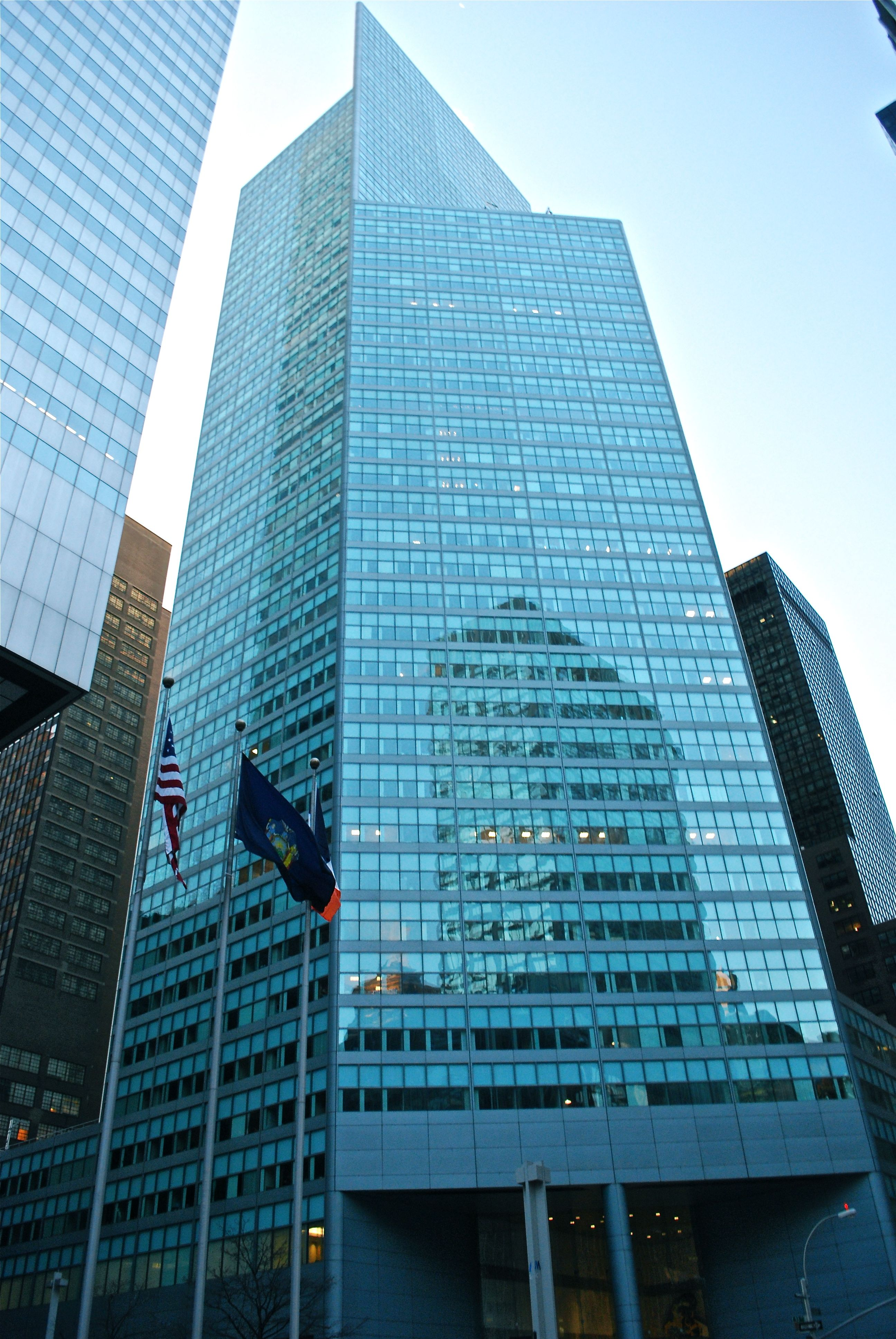 Lexington Avenue con 53